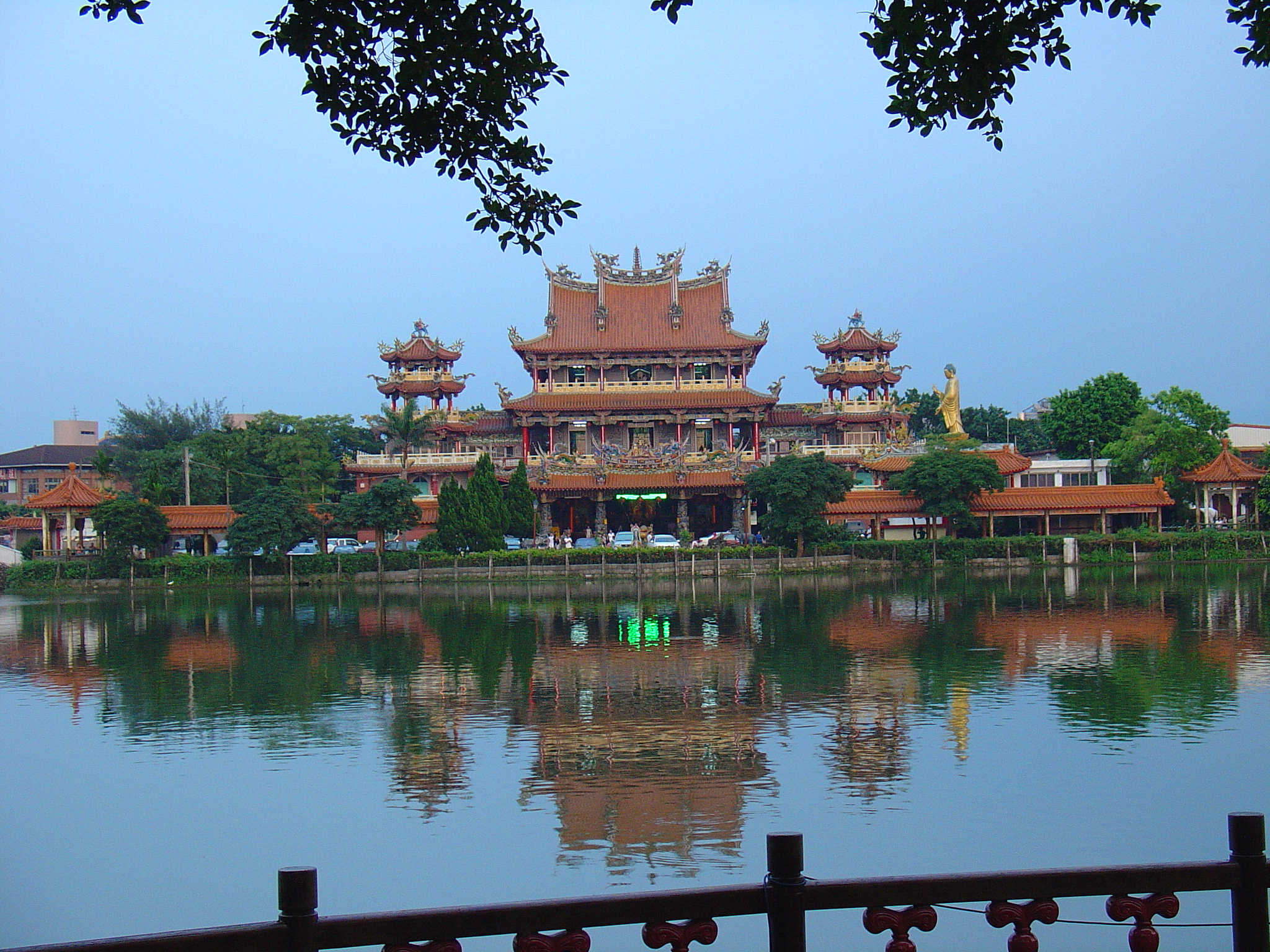 桃園縣龍潭鄉南天宮。